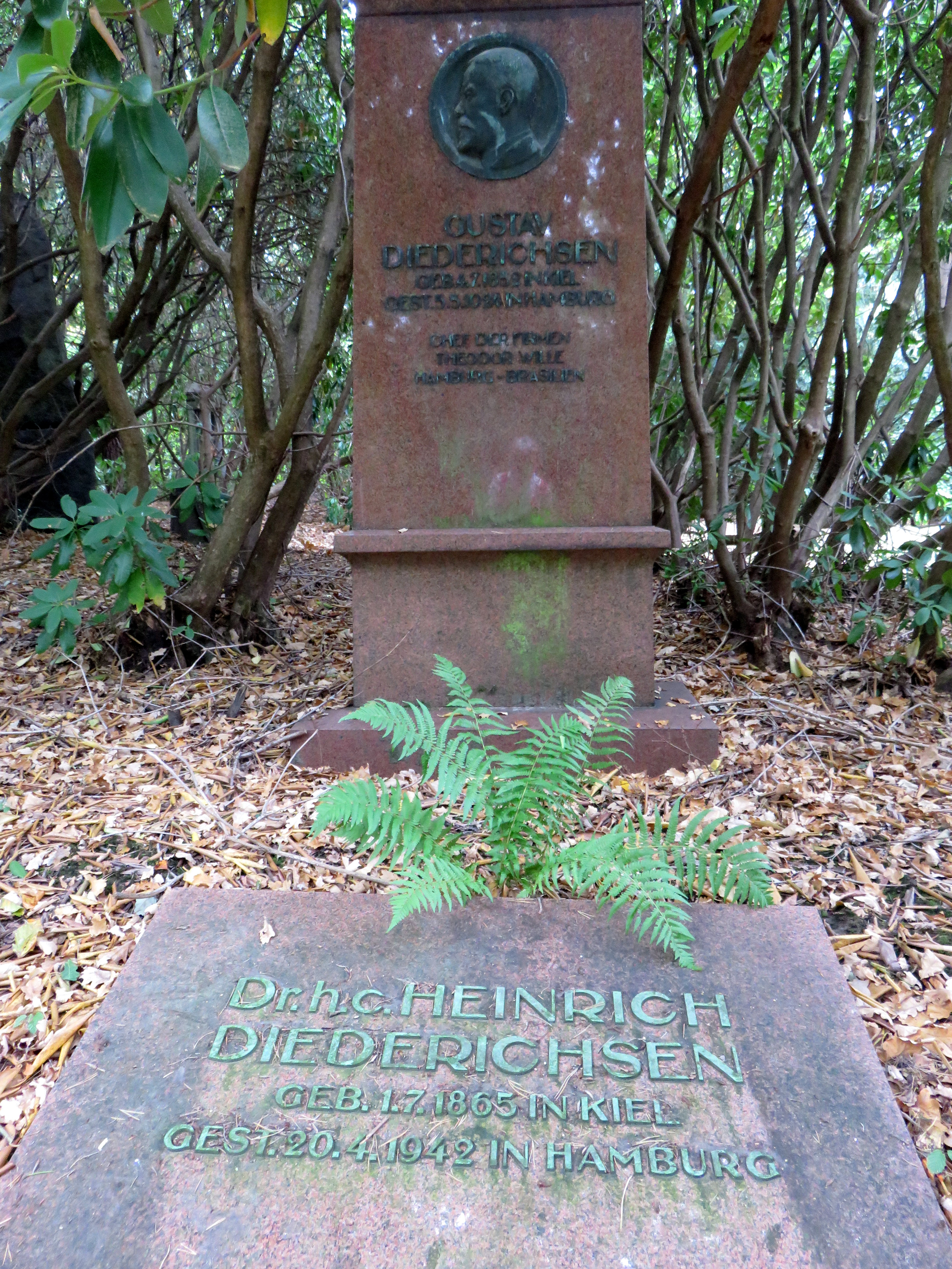 Grabplatte für den deutschen Reeder und Werftbesitzer Heinrich Diederichsen auf der Familiengrabstätte Gustav Diederichsen, Friedhof Ohlsdorf, Planquadrat Z 10 (südwestlich Nordteich). Der Obelisk mit Bronzerelief wurde vom deutschen Bildhauer Max Hartung (*1881) gestaltet.Details: Barbara Leisner, Heiko K. L. Schulze, Ellen Thormann: Der Hamburger Hauptfriedhof Ohlsdorf. Geschichte und Grabmäler, Verlag Hans Christians, Hamburg 1990, ISBN 3-7672-1060-6, Seite 191 (Register).